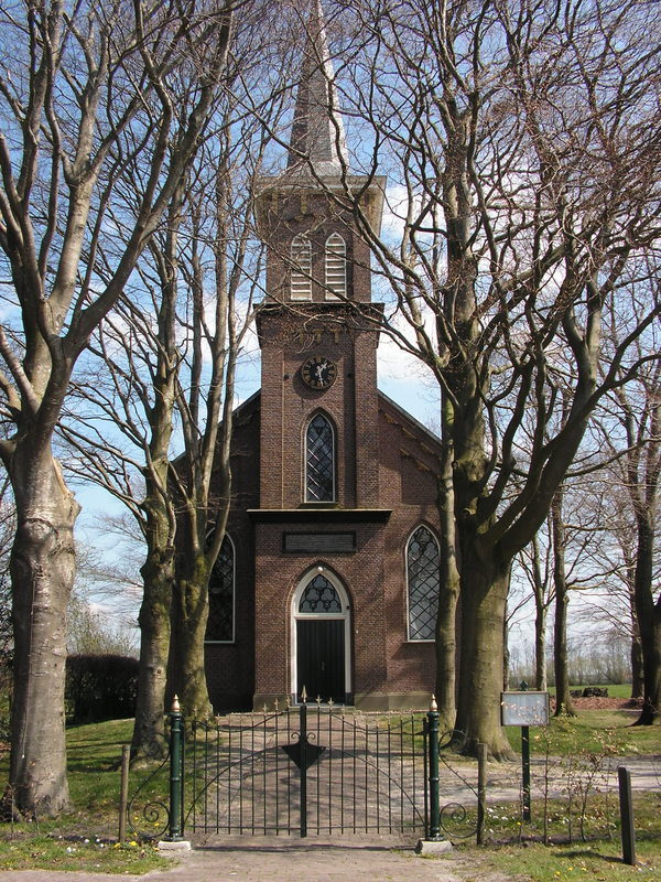 Weststellingwerf - Oldeholtwolde - Hervormde kerk